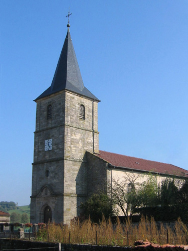 Eglise de l'Invention de Saint-Etienne